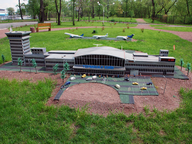 Парк «Киев в миниатюре»